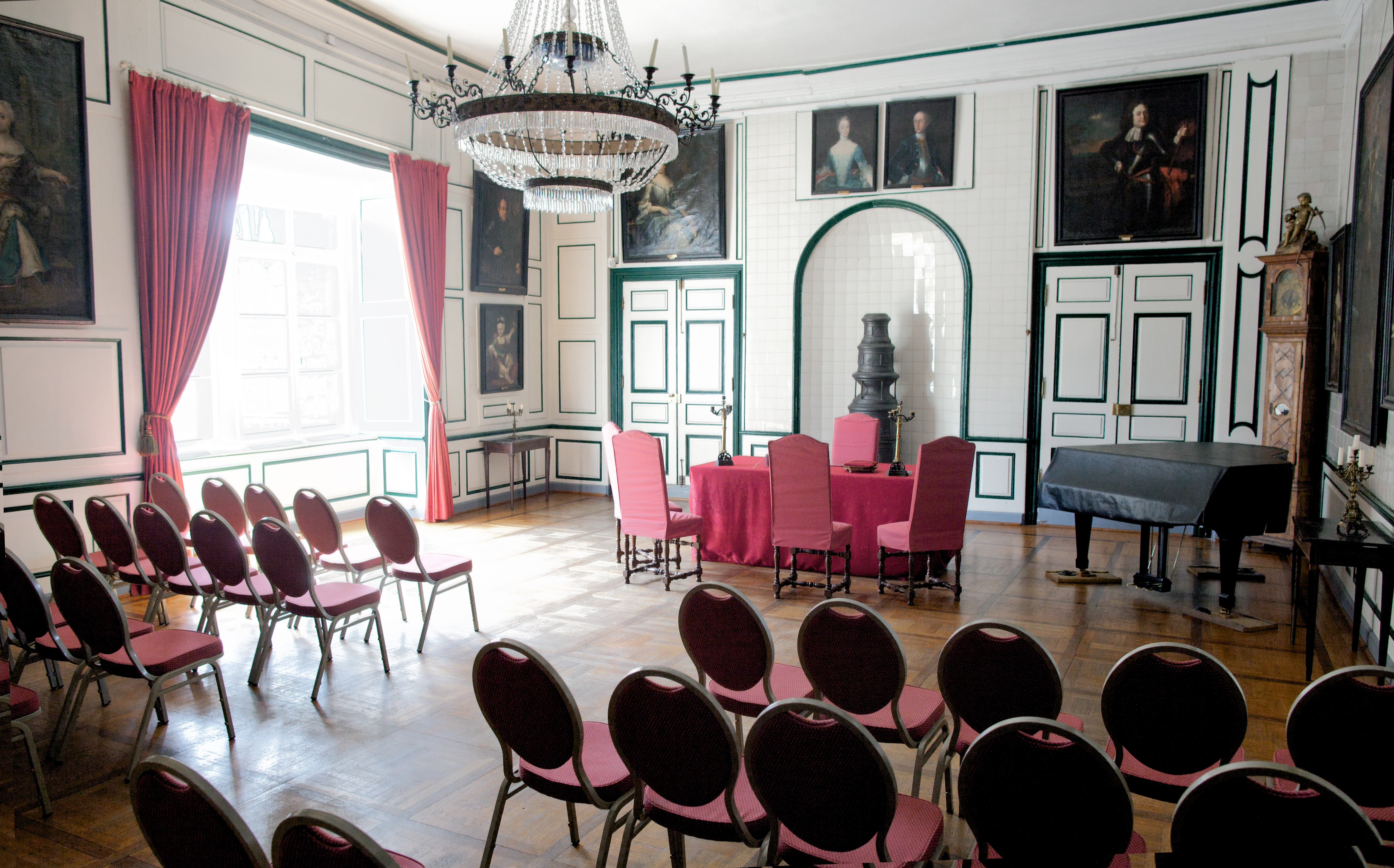 Der Fürstensaal im Schloss Hohenlimburg, beliebt für standesamtliche Hochzeiten in Hagen